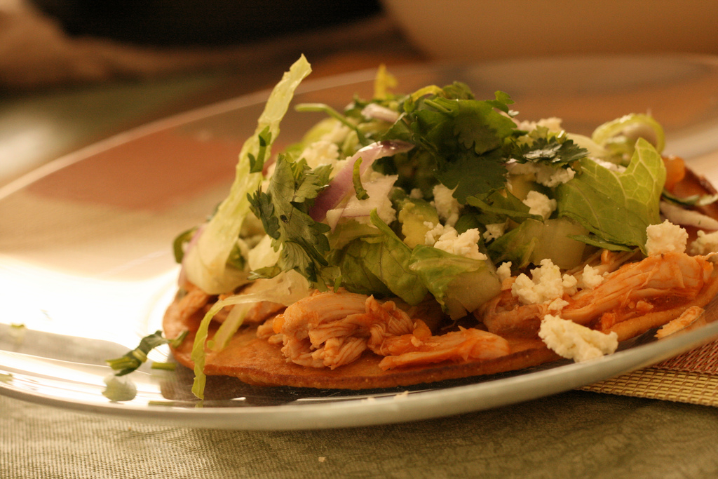 Tostada de tinga (carne deshebrada de pollo o res sazonada con salsa de jitomate y chile chipotle). La tinga es originaria de Puebla (México).